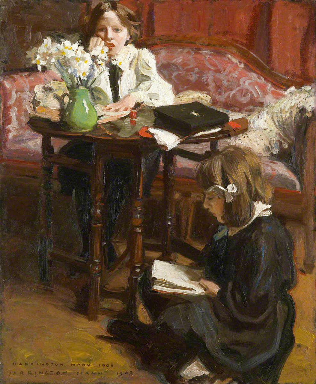 Harrington Mann (1864-1937)_0013